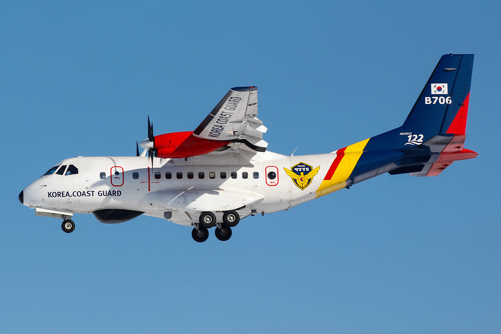 B706 (cn N059)